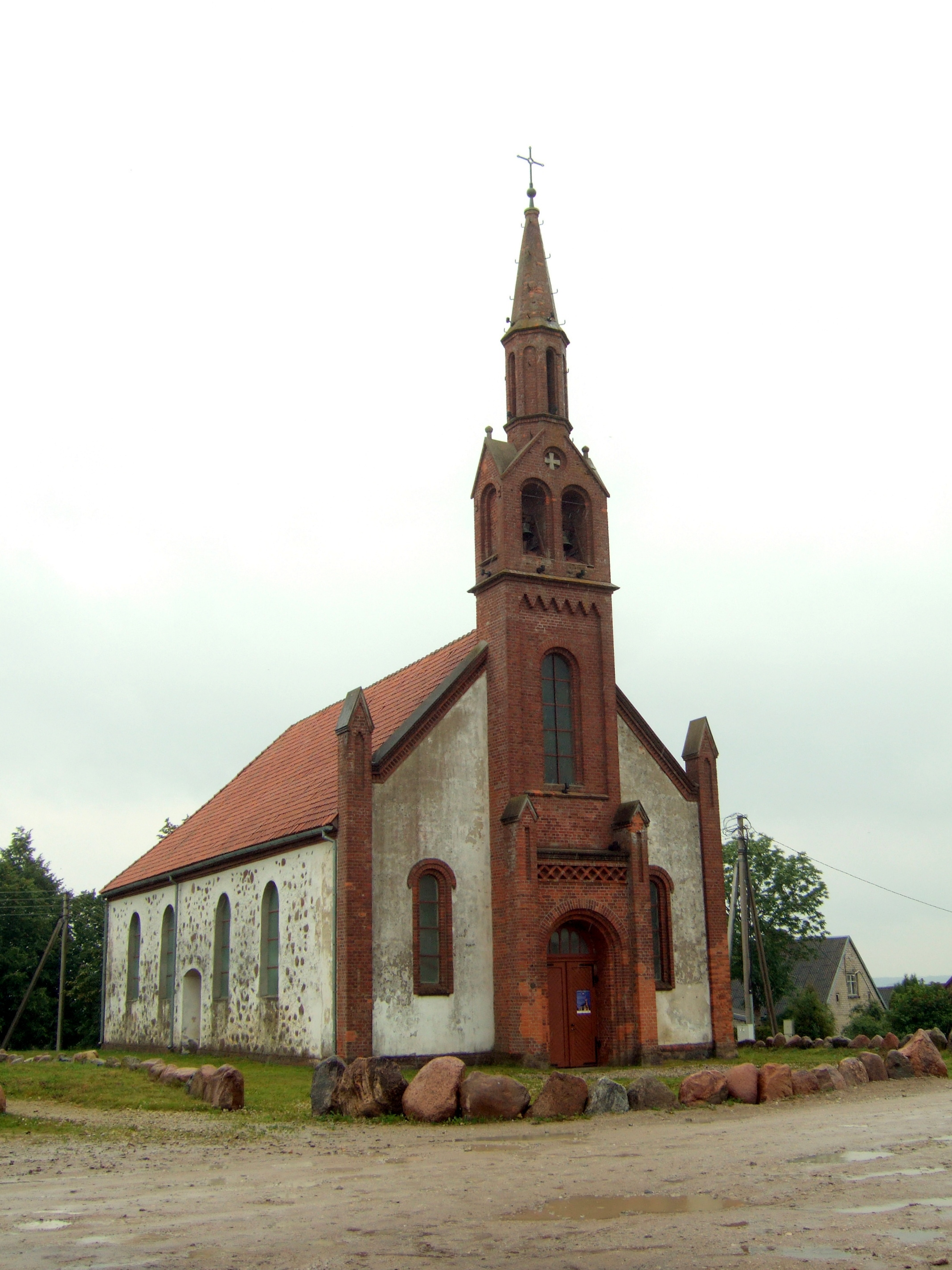 Evangelikų liuteronų bažnyčia Kretingalėje